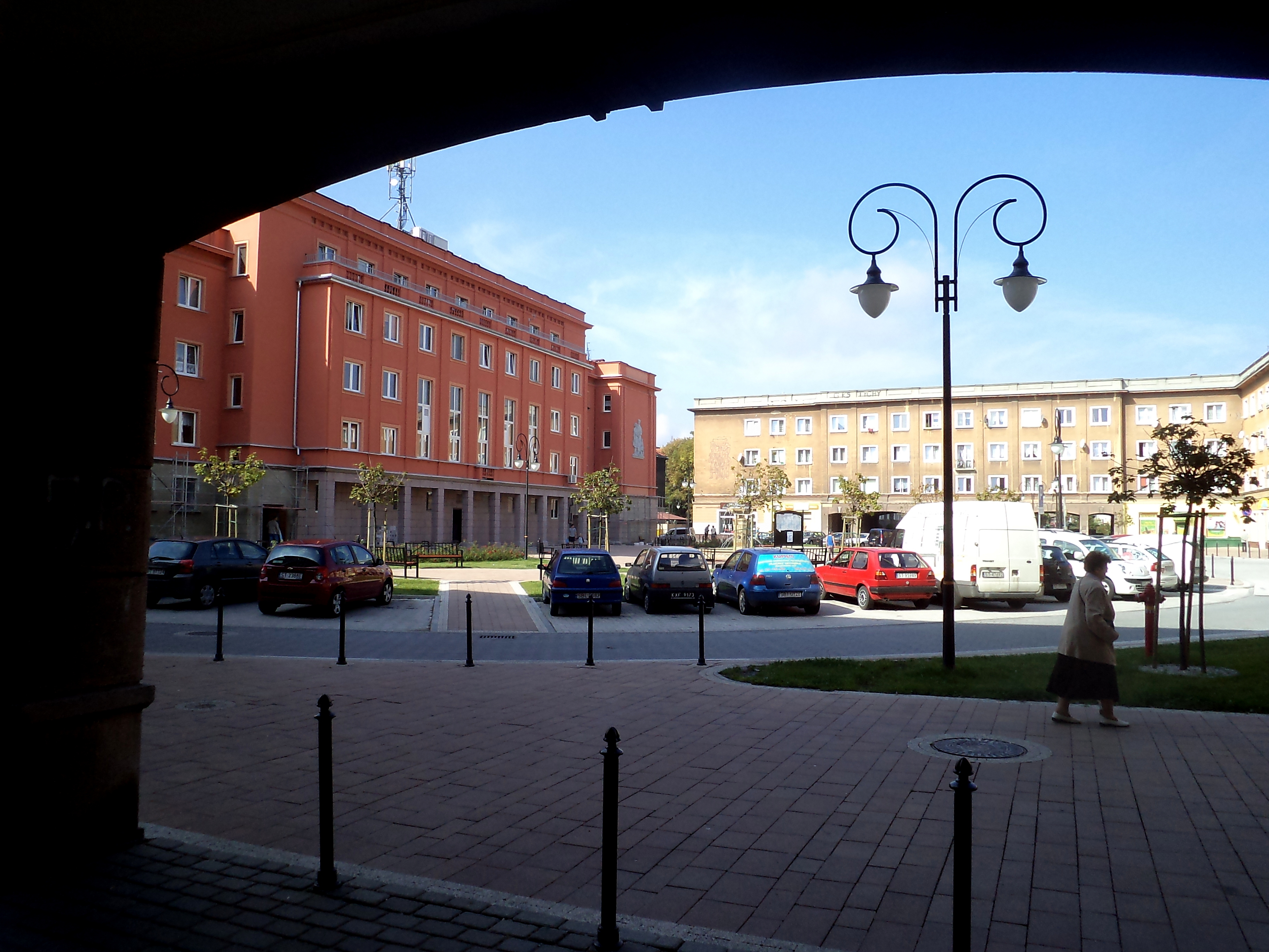 Osiedle A (zwane też Osiedlem Anna) – tyskie osiedle położone w dzielnicy Śródmieście, zrealizowane w latach 1951–1956.